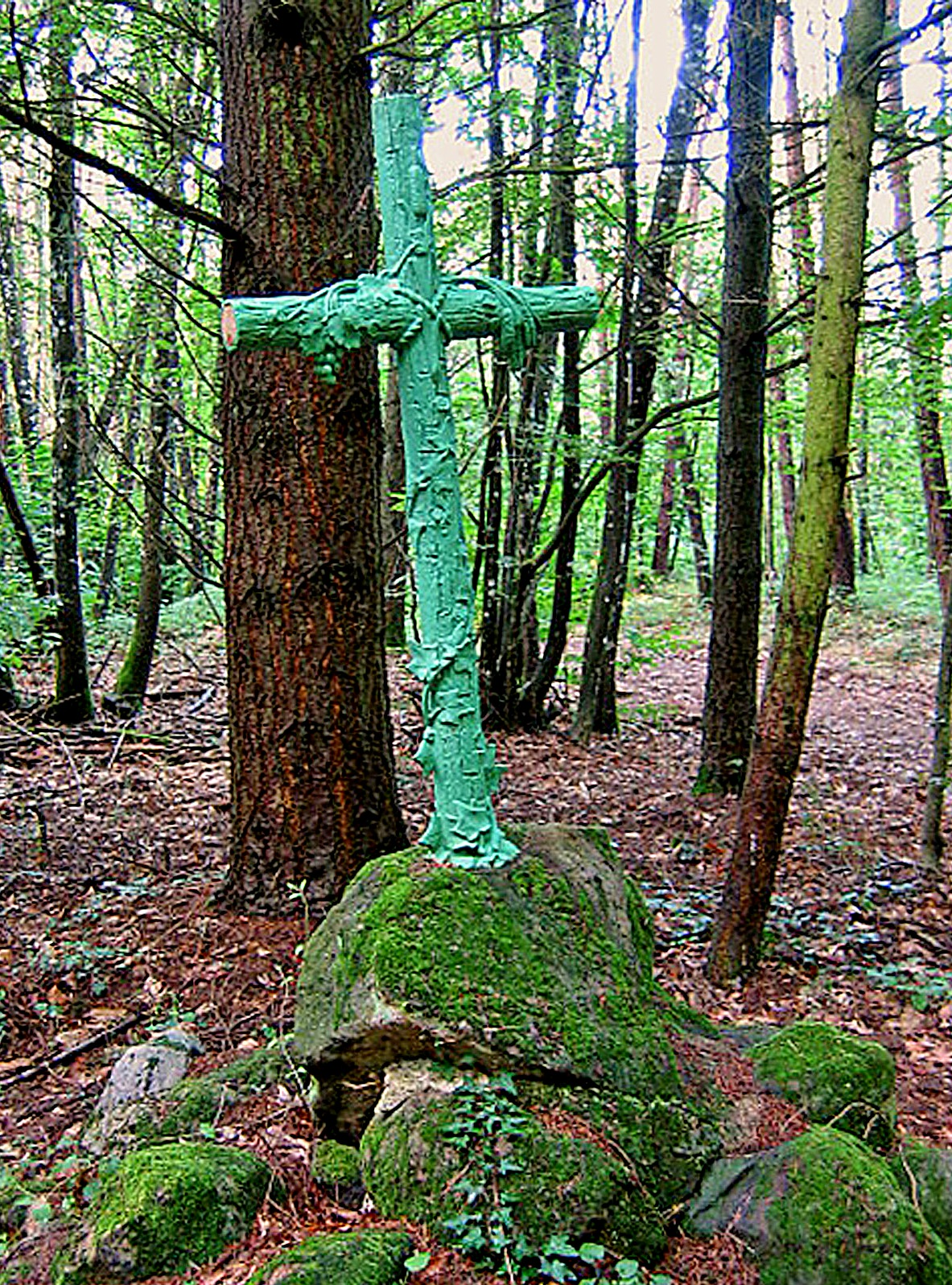 Croix ornée de rameaux de vigne et épis de blé, située en Forêt de Tronçais, à la limite des communes de Braize et Urçay.